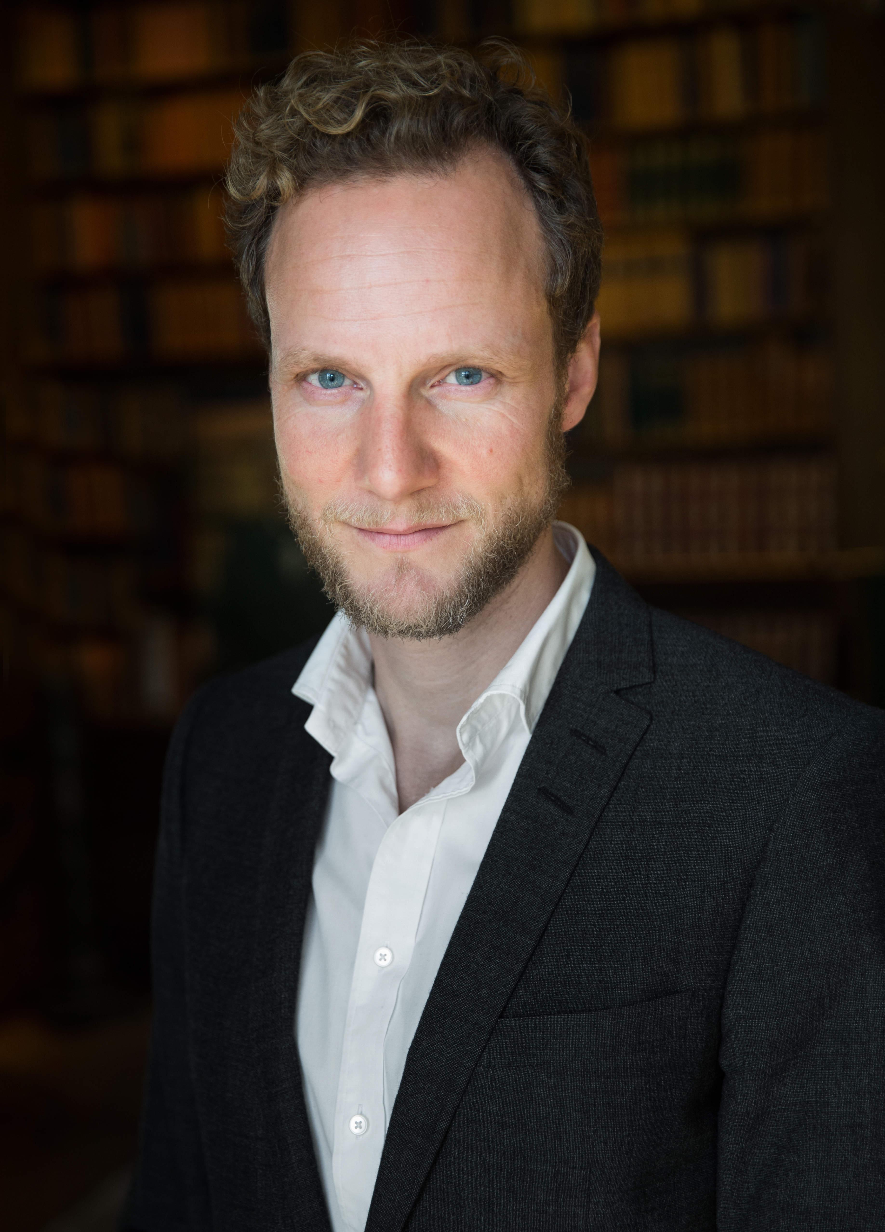 Journalisten Bo-Göran Bodin.